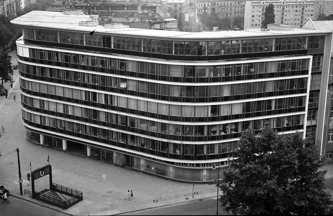 Das Haus Hardenberg in Berlin-Charlottenburg.